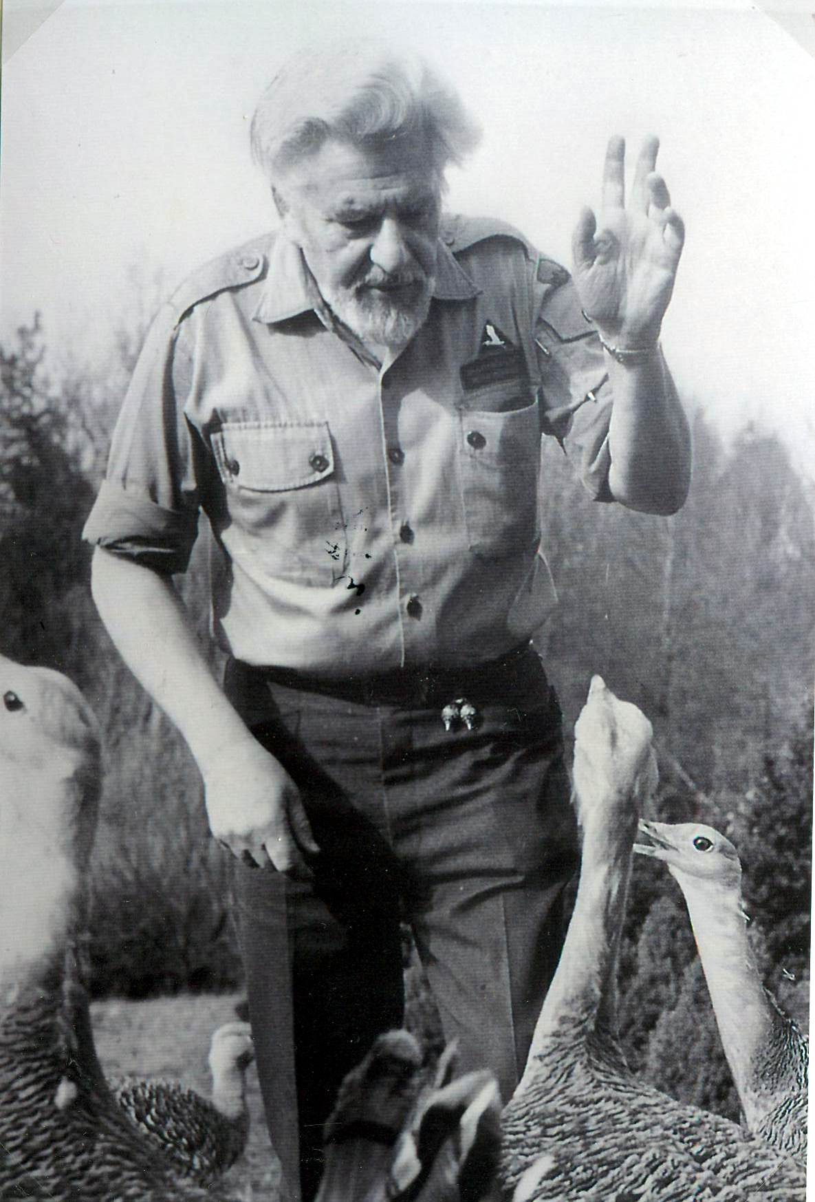 Der Verhaltensforscher Otto Koenig mit Grosstrappen. Auf der Forschungsstation Wilhelminenberg, Wien, Österreich. 1987